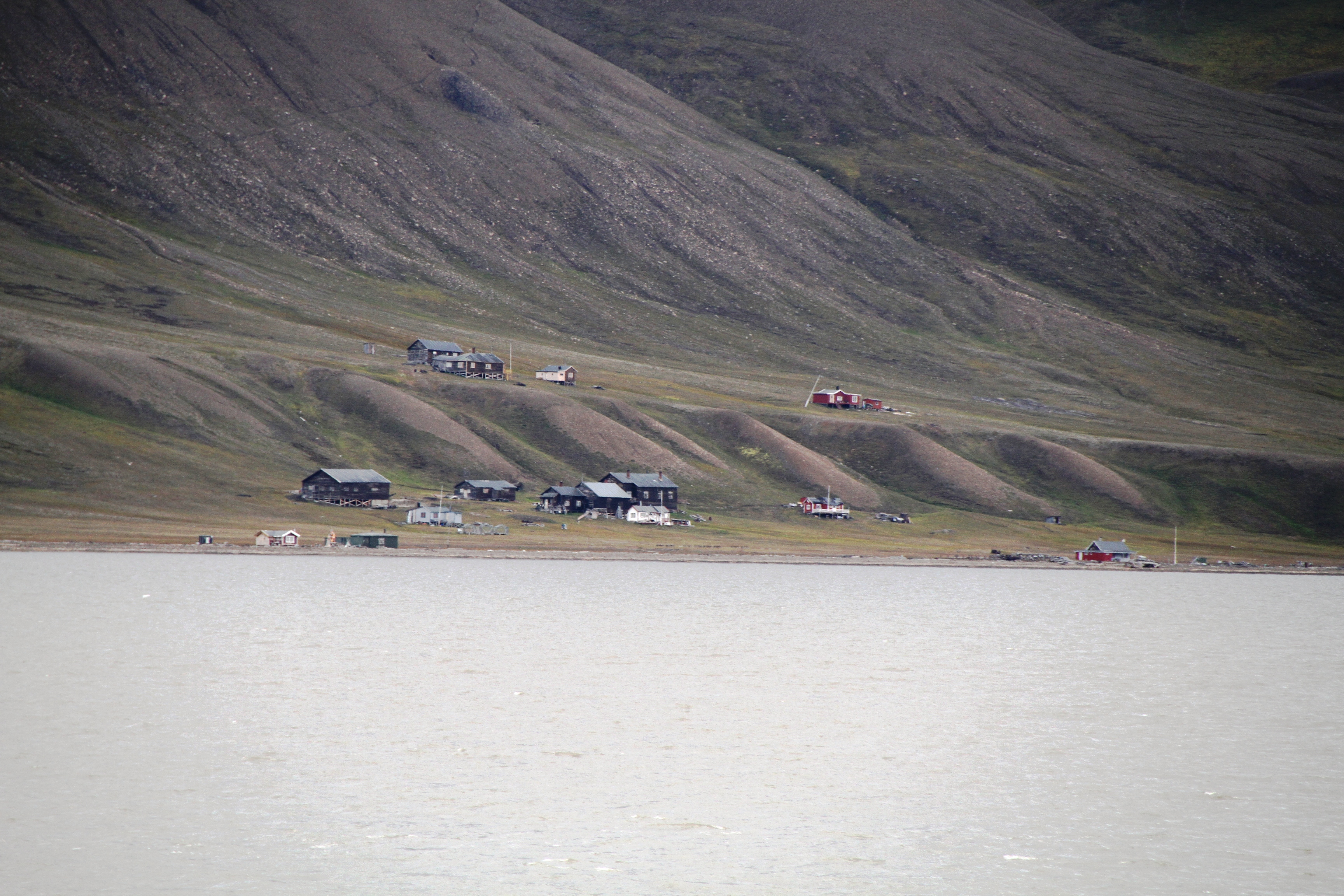 Hjorthamn coal community in Adventfjorden opposite Longyearbyen, Svalbard